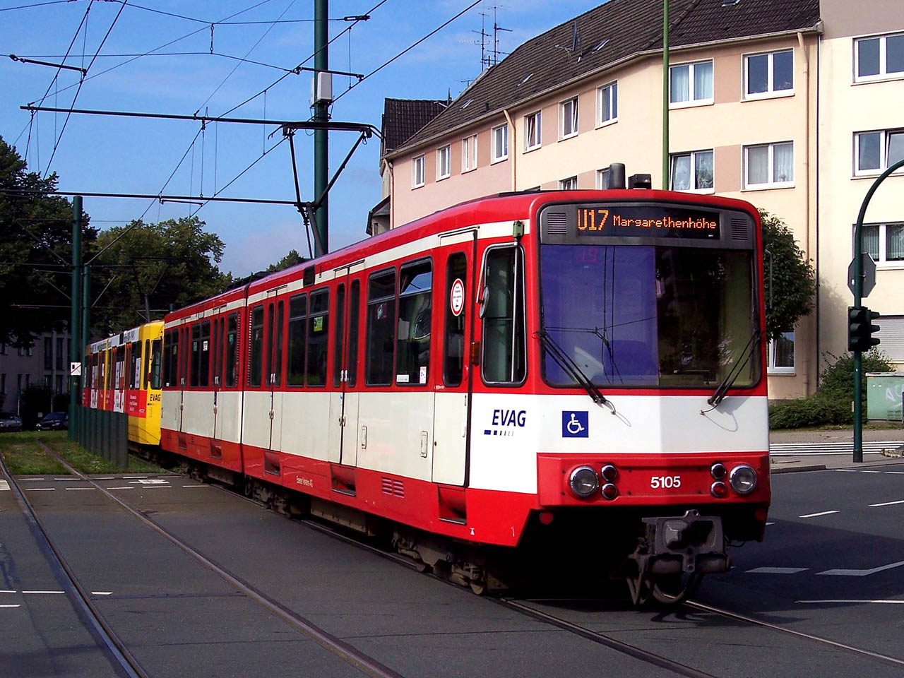 DUEWAG B80C light rail vehicle 5105 of Essener Verkehrs-AG, Essen, Germany at Holsterhauser Platz in original livery.